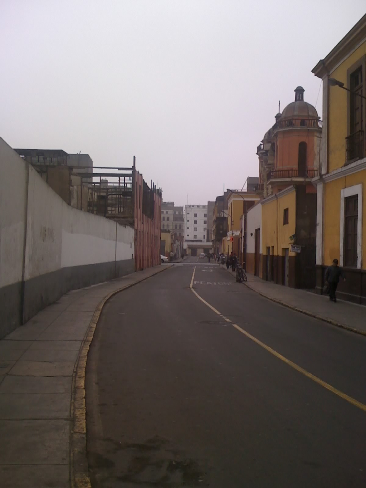 vista del jirón Apurímac en el centro de Lima, Perú.